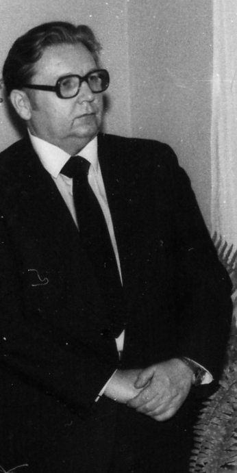 Kazimierz Urbanik na jubileuszu 60-lecia (i 40-lecia pracy naukowej) prof. Henryka Zielińskiego na Uniwersytecie Wrocławskim